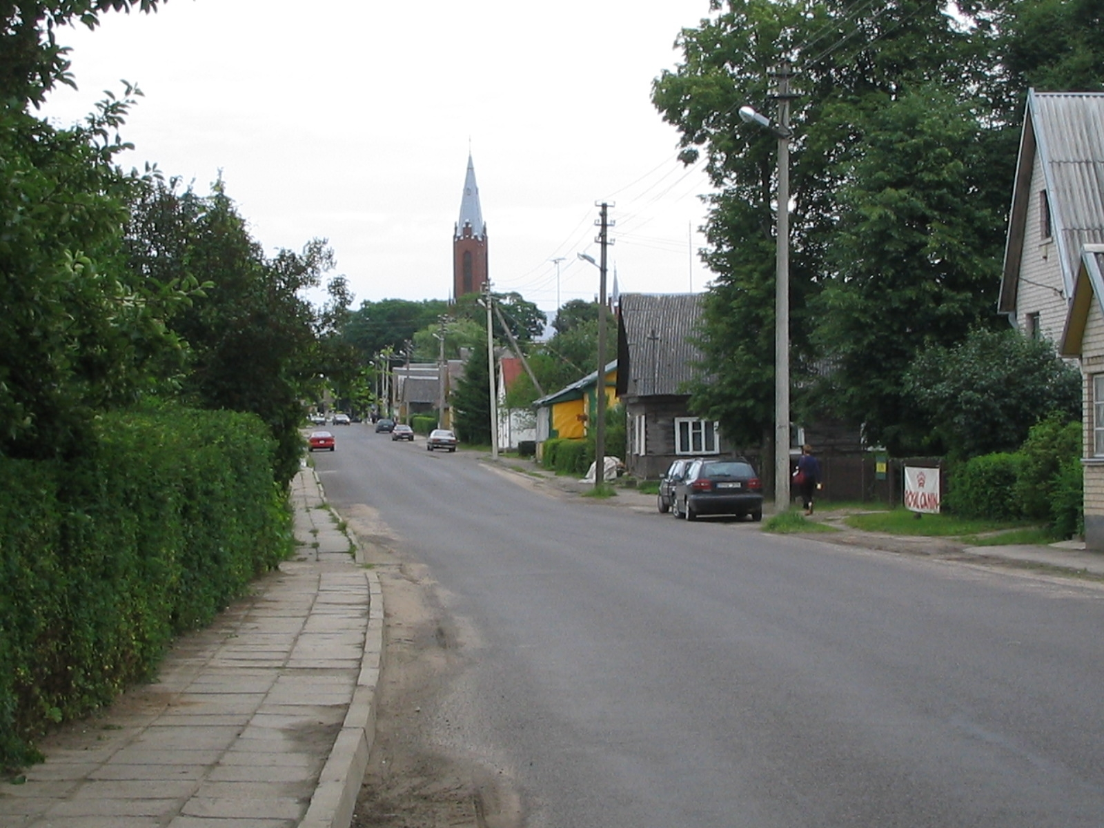 Žiežmariai